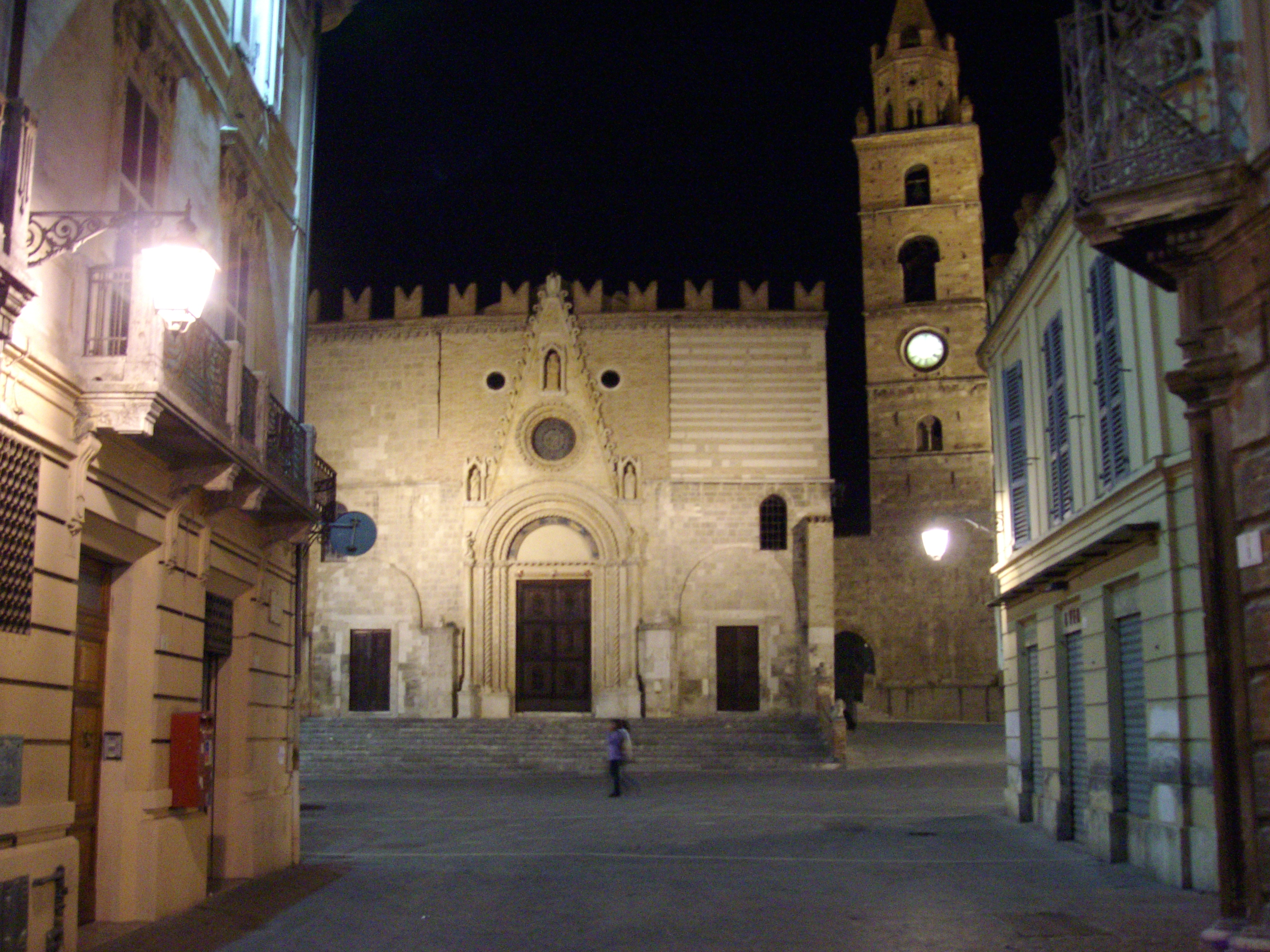 Cattedrale di San Berardo vista dal Corso "vecchio"